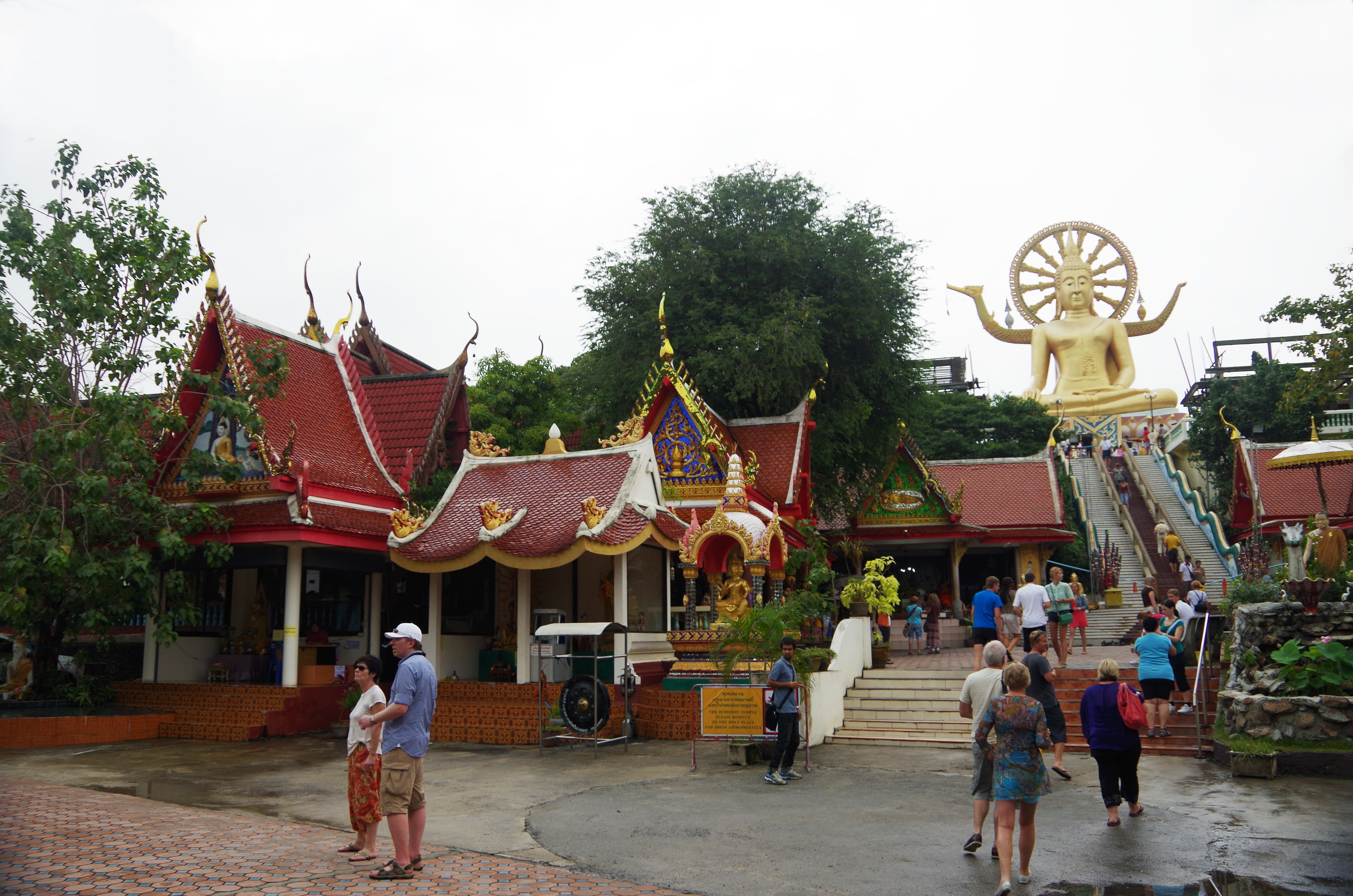 Tempel Wat Phra Yay (Big Buddha), Ko Samui